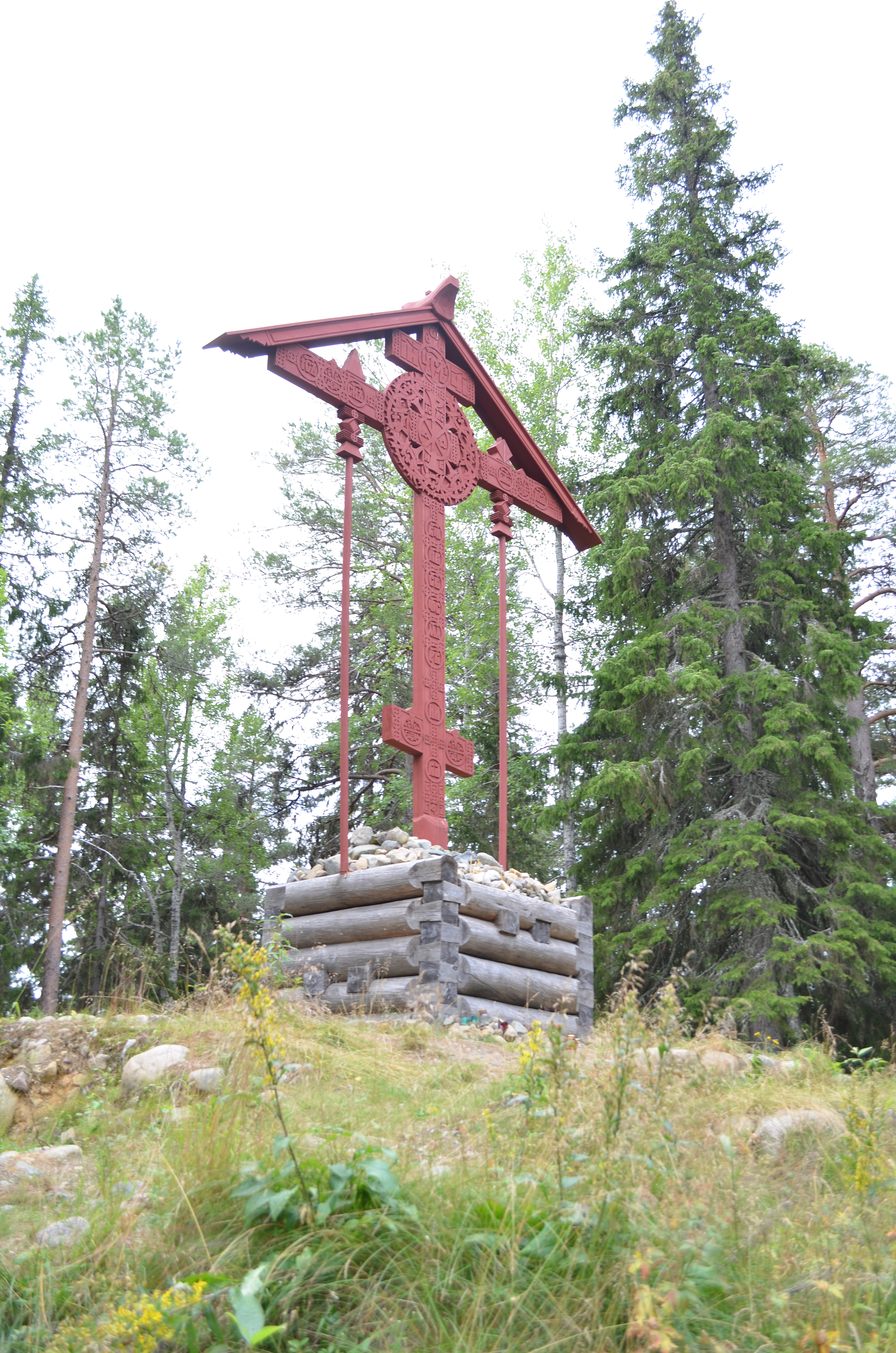 Секірна гора